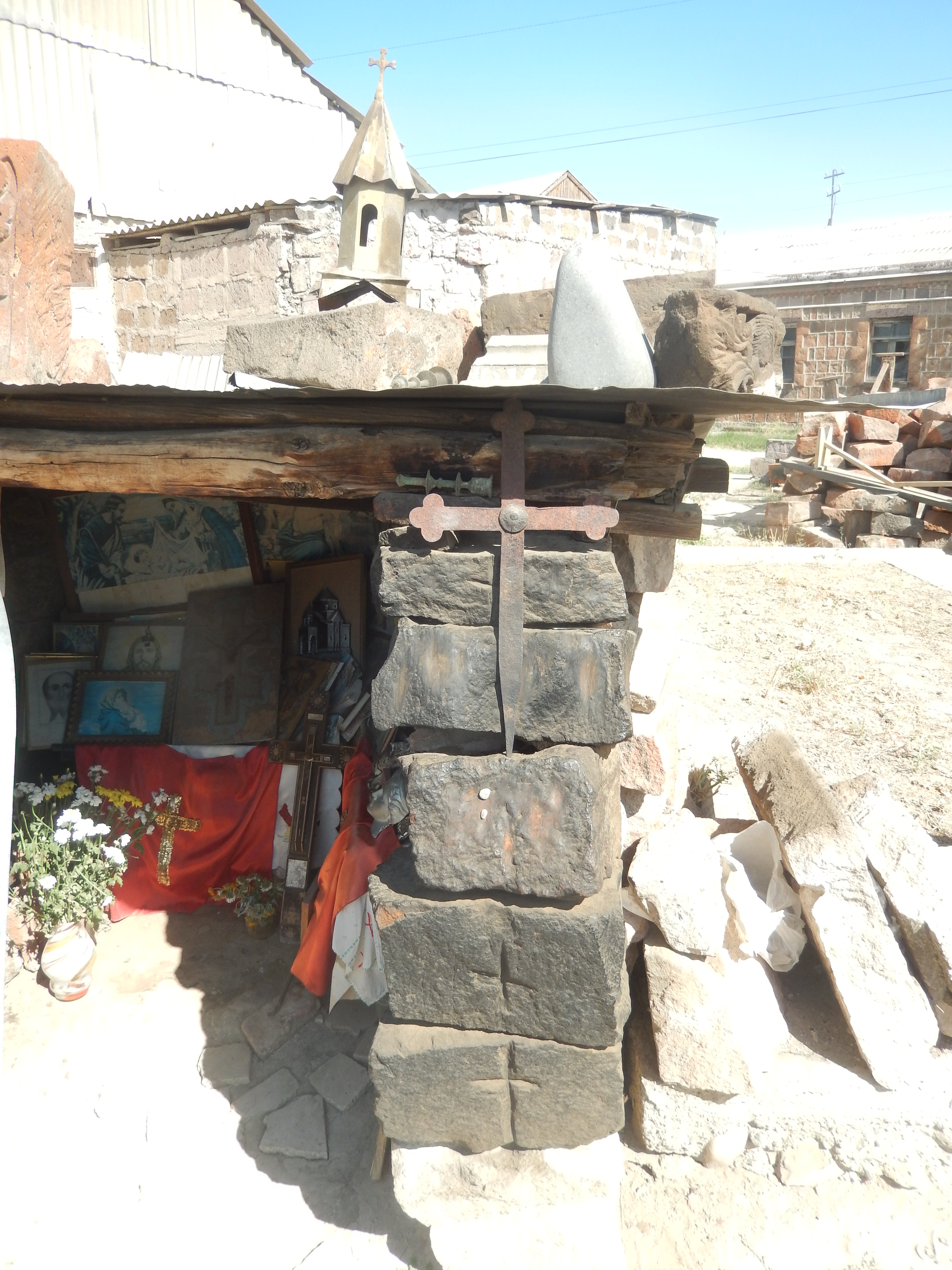 Սուրբ Աստվածածին, Մրգավան, հիմնավեր, ընթանում են շինարարական աշխատանքներ 61/2